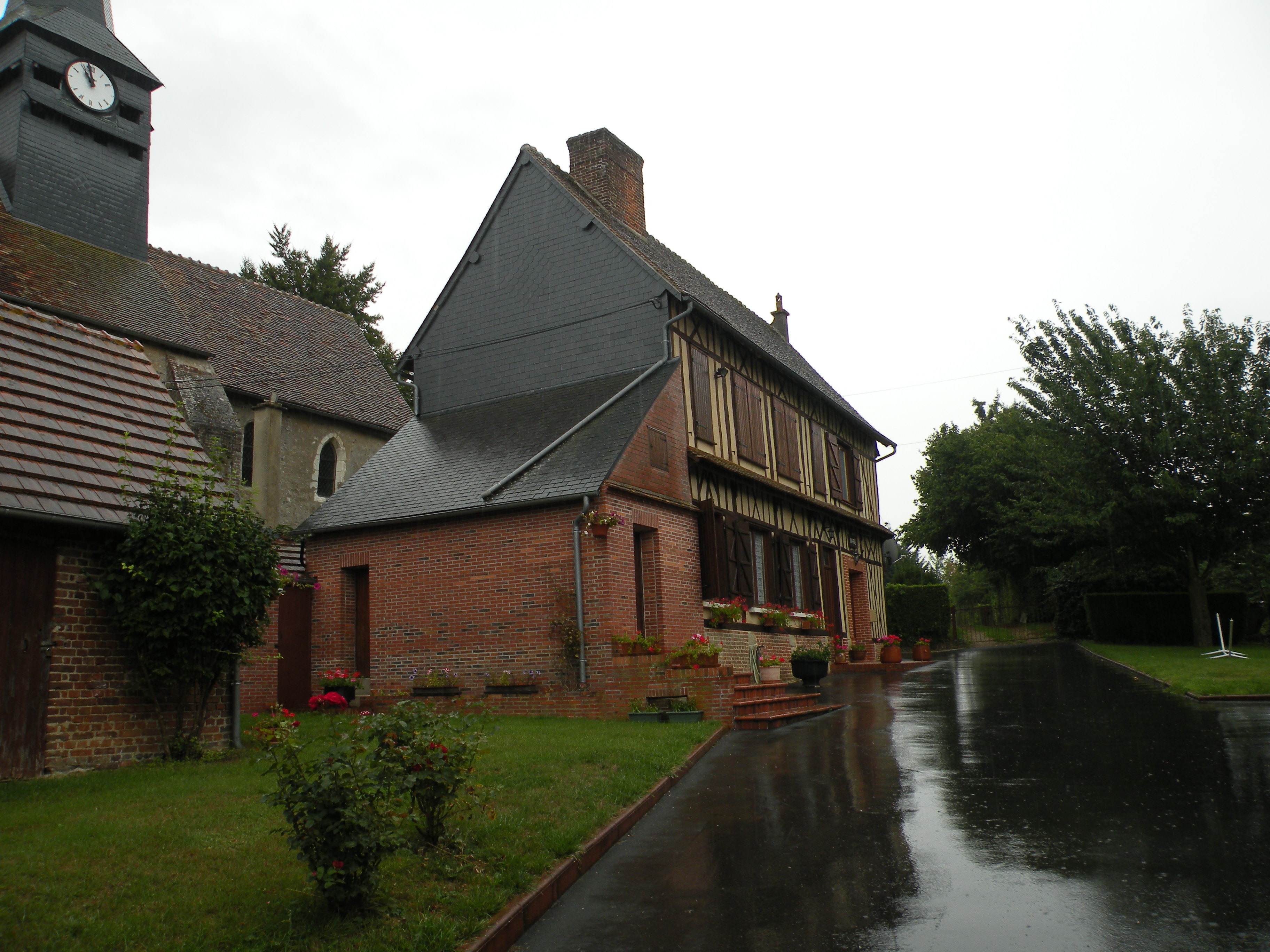 Vrocourt